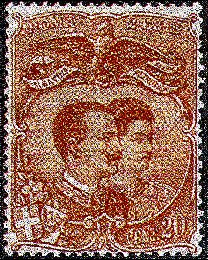 Francobollo relativo alle nozze del principe VIttorio Emanuele III